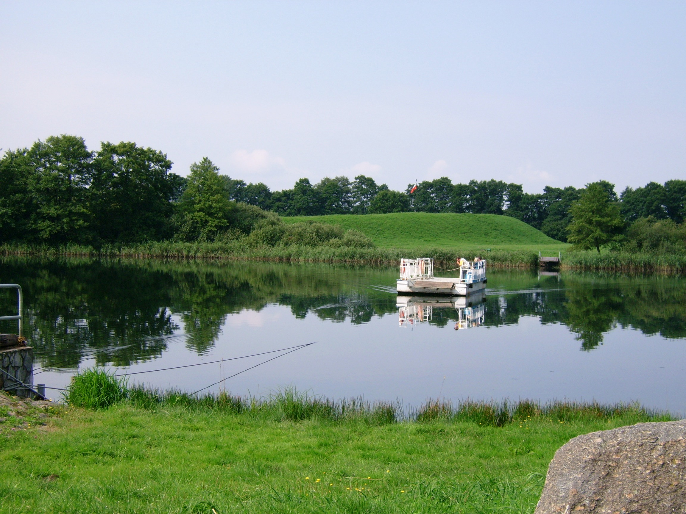 Ostrów Lednicki z ruinami grodziska (zabytek nr rejestr. A/2404)